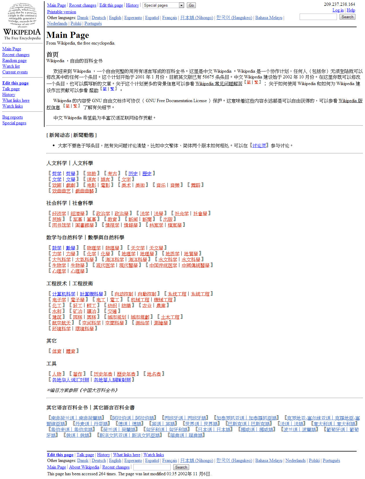 中文維基百科於 2002 年 11 月 6 日時的網頁截圖